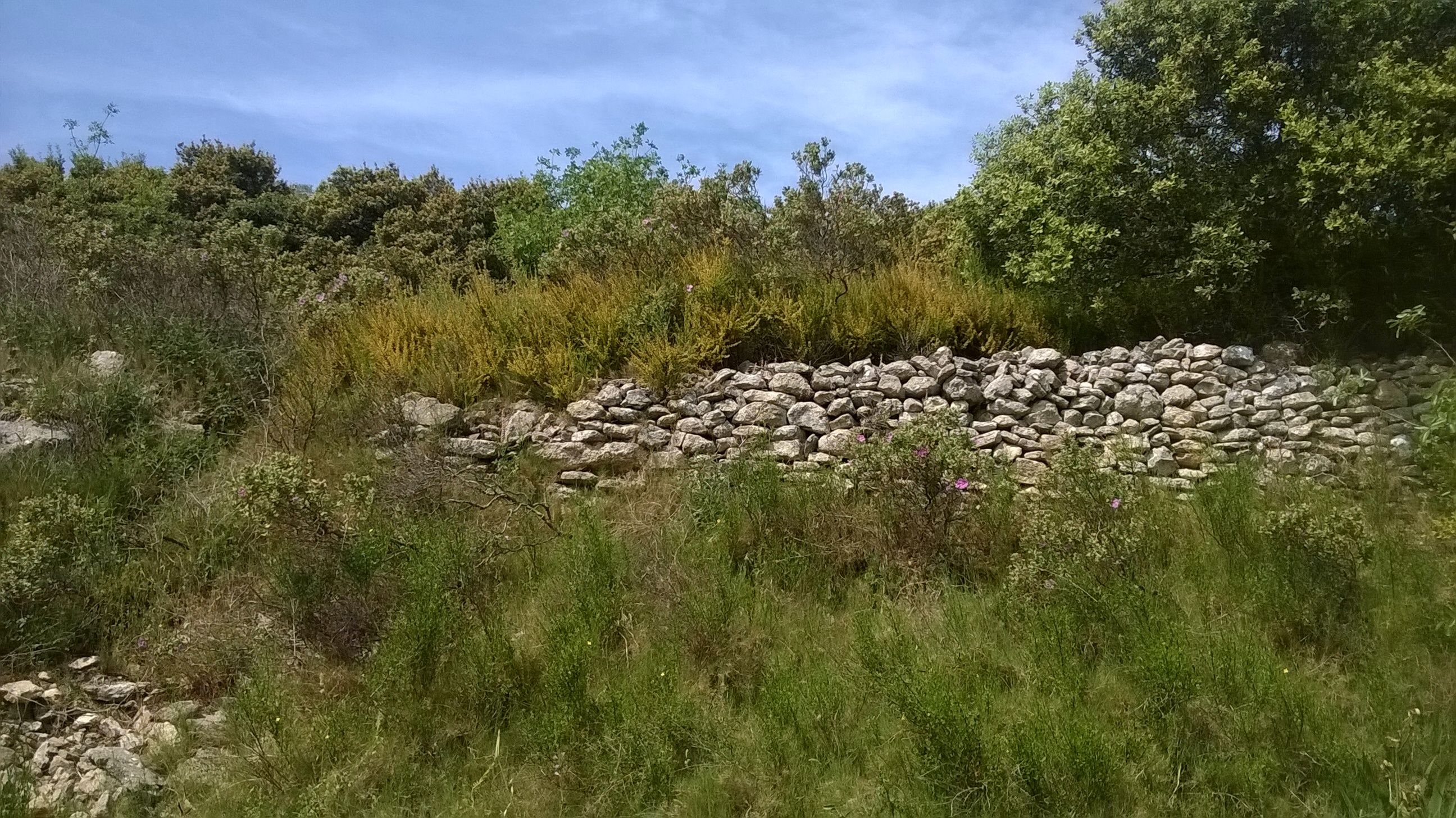 Prise par M. Thomy Mas